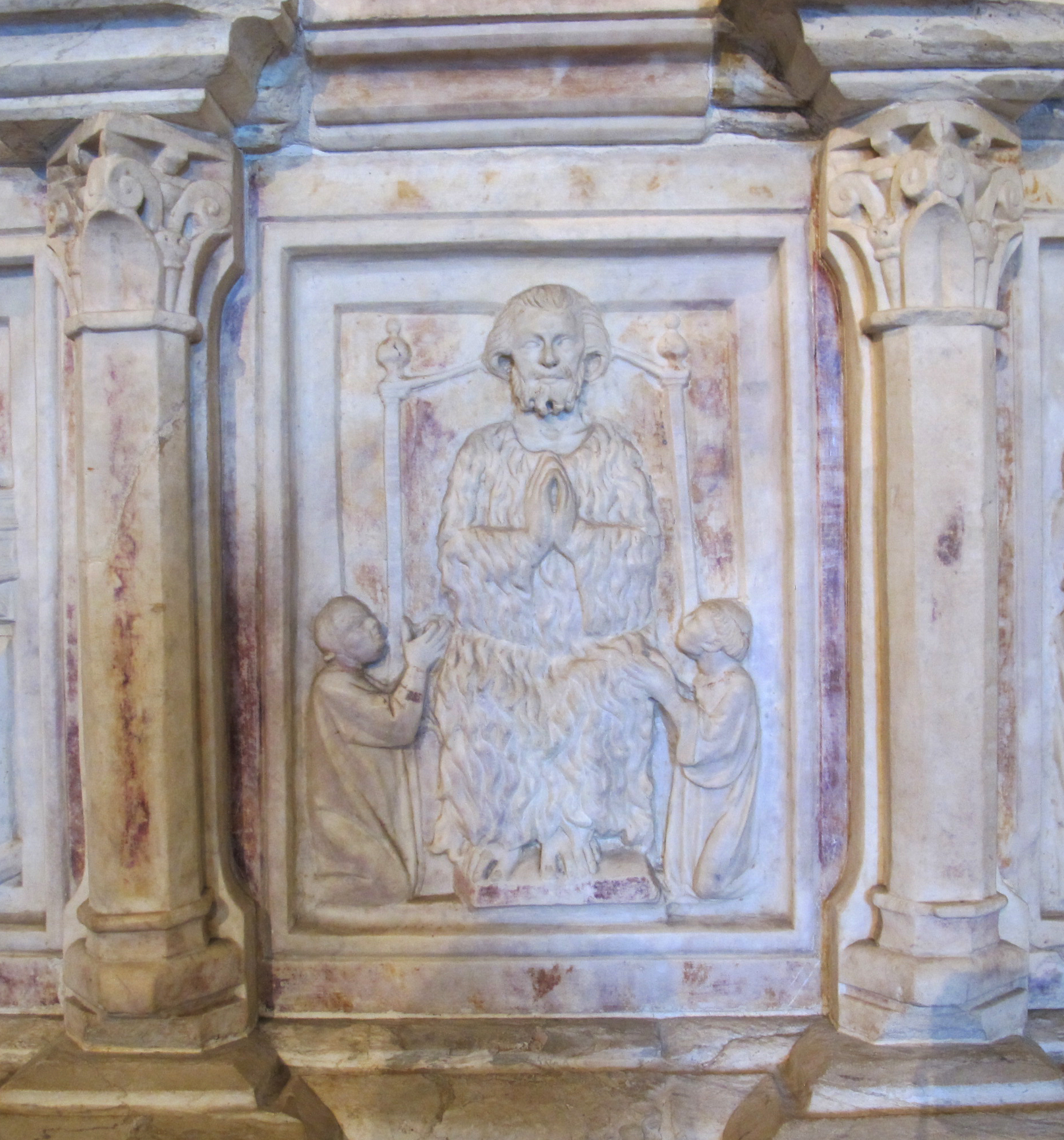 Tino di camaino, tomba-altare di san ranieri